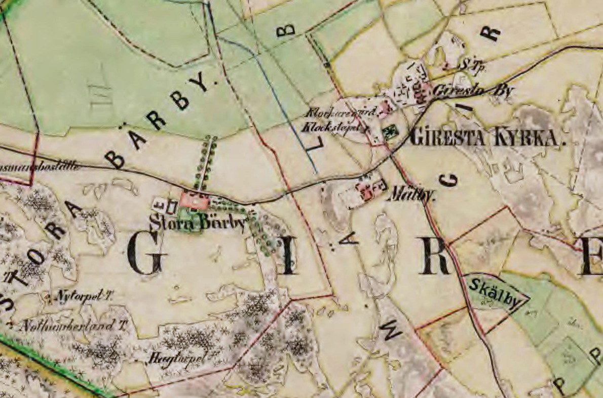 Stora Bärby, Giresta kyrka på äradsekonomiska kartan